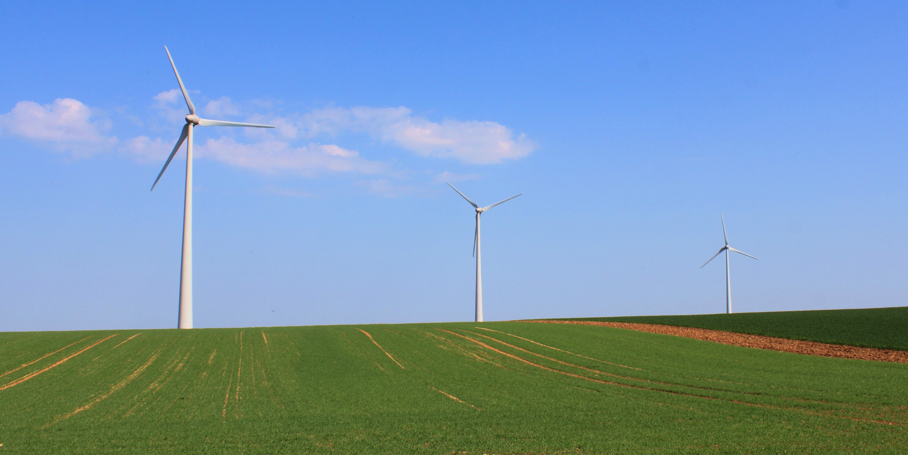 Parc éolien de Grimault-Massangis, Grimault-Massangis, Yonne, France